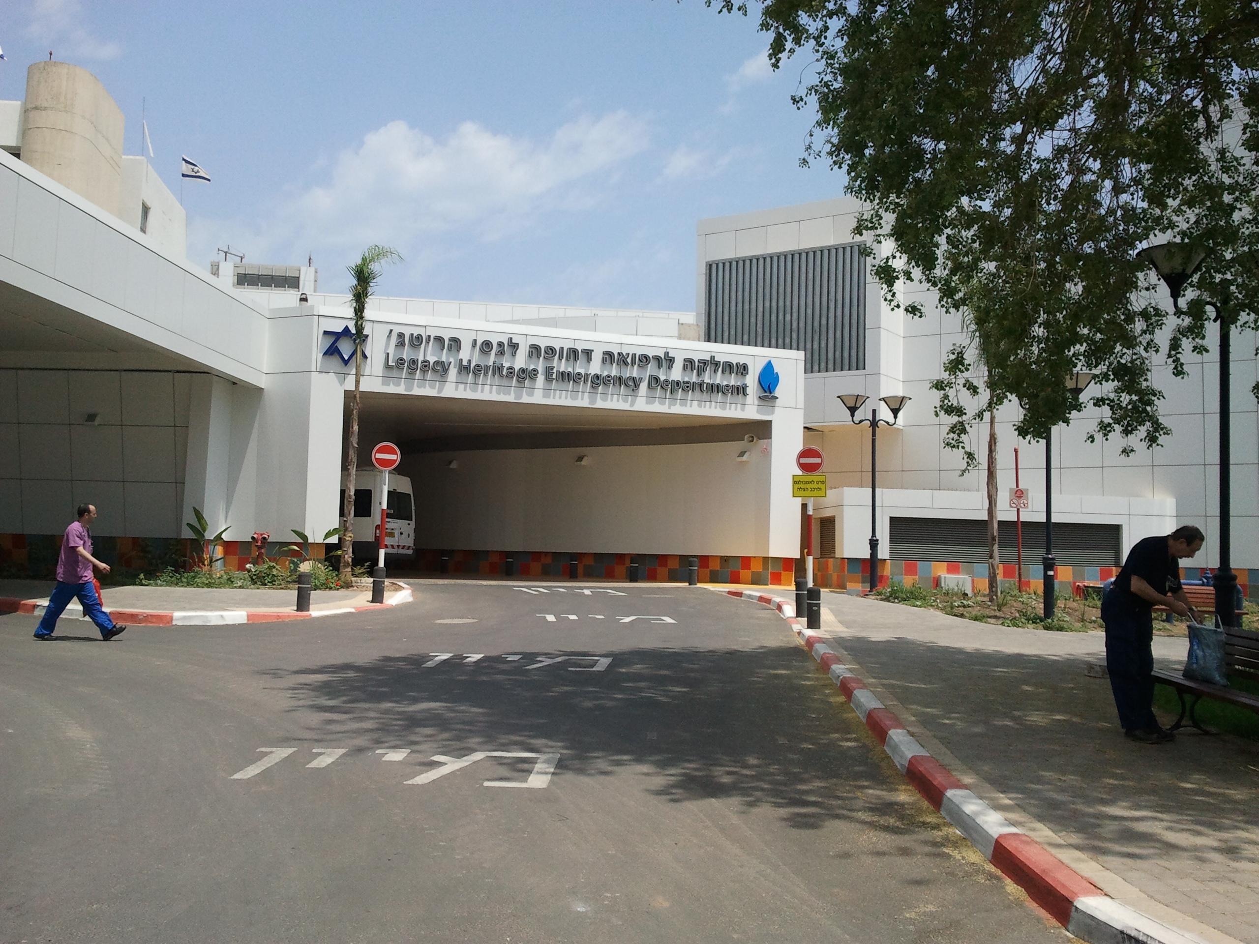 בית חולים נהריה מחלקה לרפואה דחופה, כניסה לחדר מיון